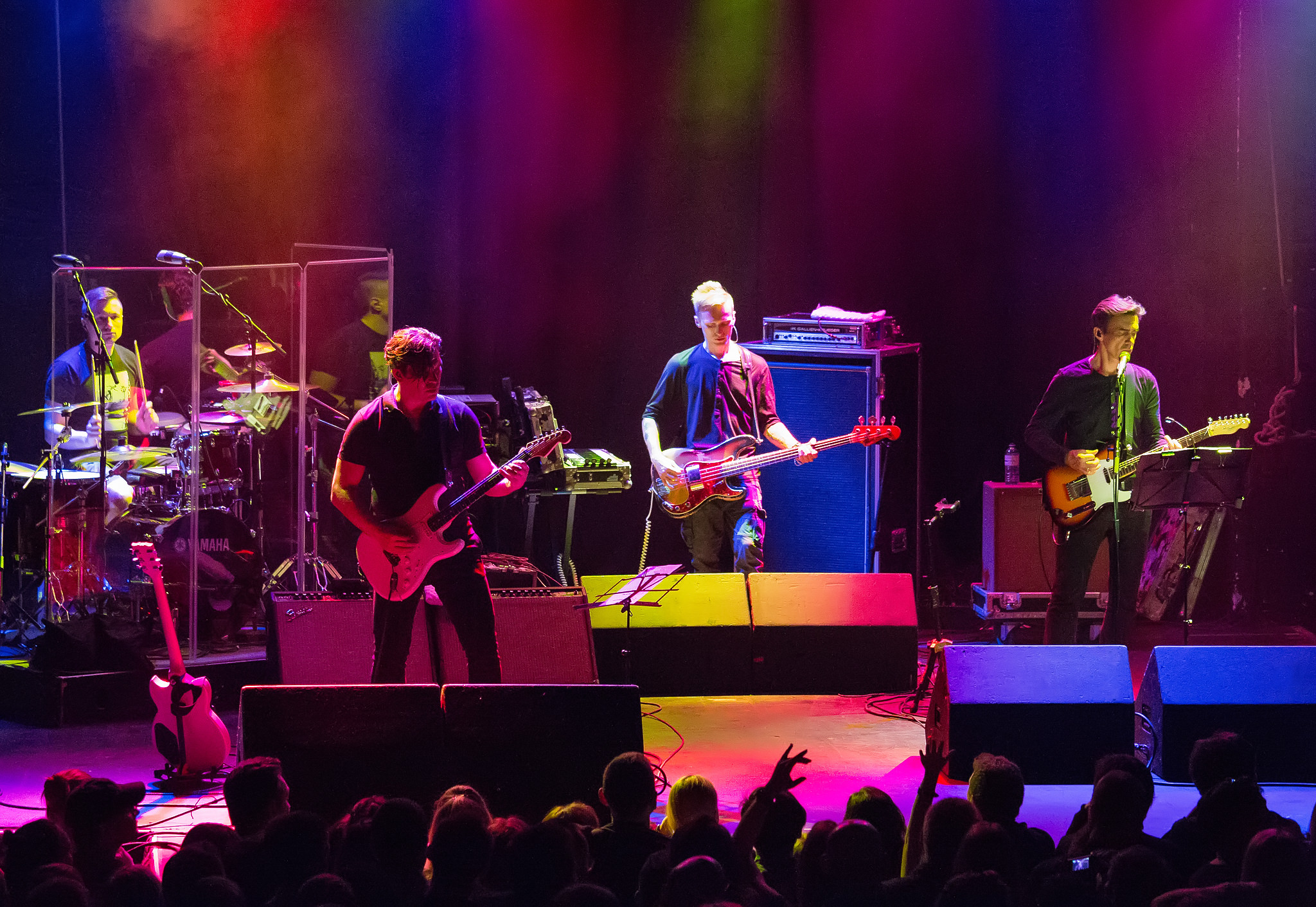 «Ю-Питер» - российская рок-группа. Фото с концерта в Торонто (июнь 2016)